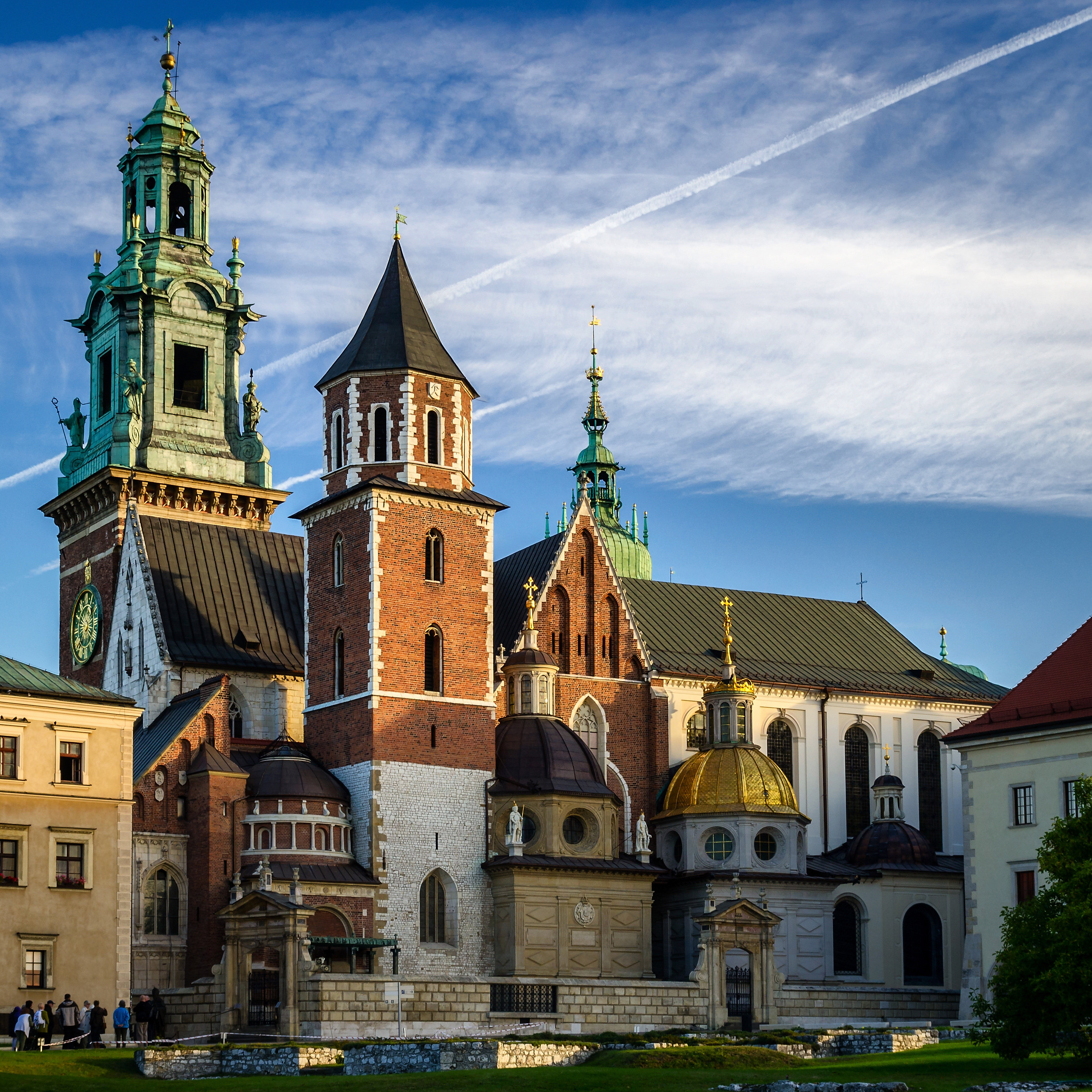 Kraków, katedra p.w. śś. Wacława i Stanisława Biskupa, XI/XII, XIV, XIX